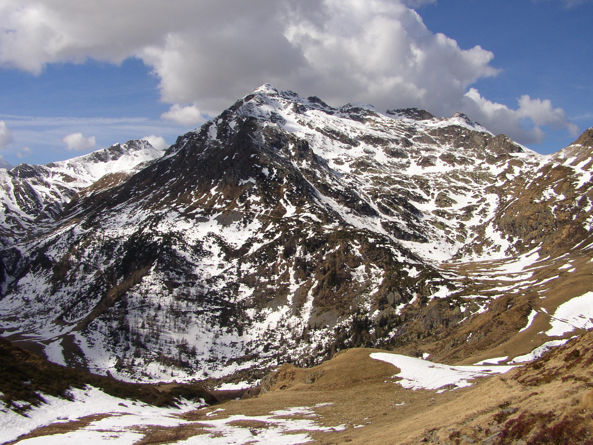 Il Monte Ponteranica visto da Ca' San Marco, Valle Brembana, Bergamo.